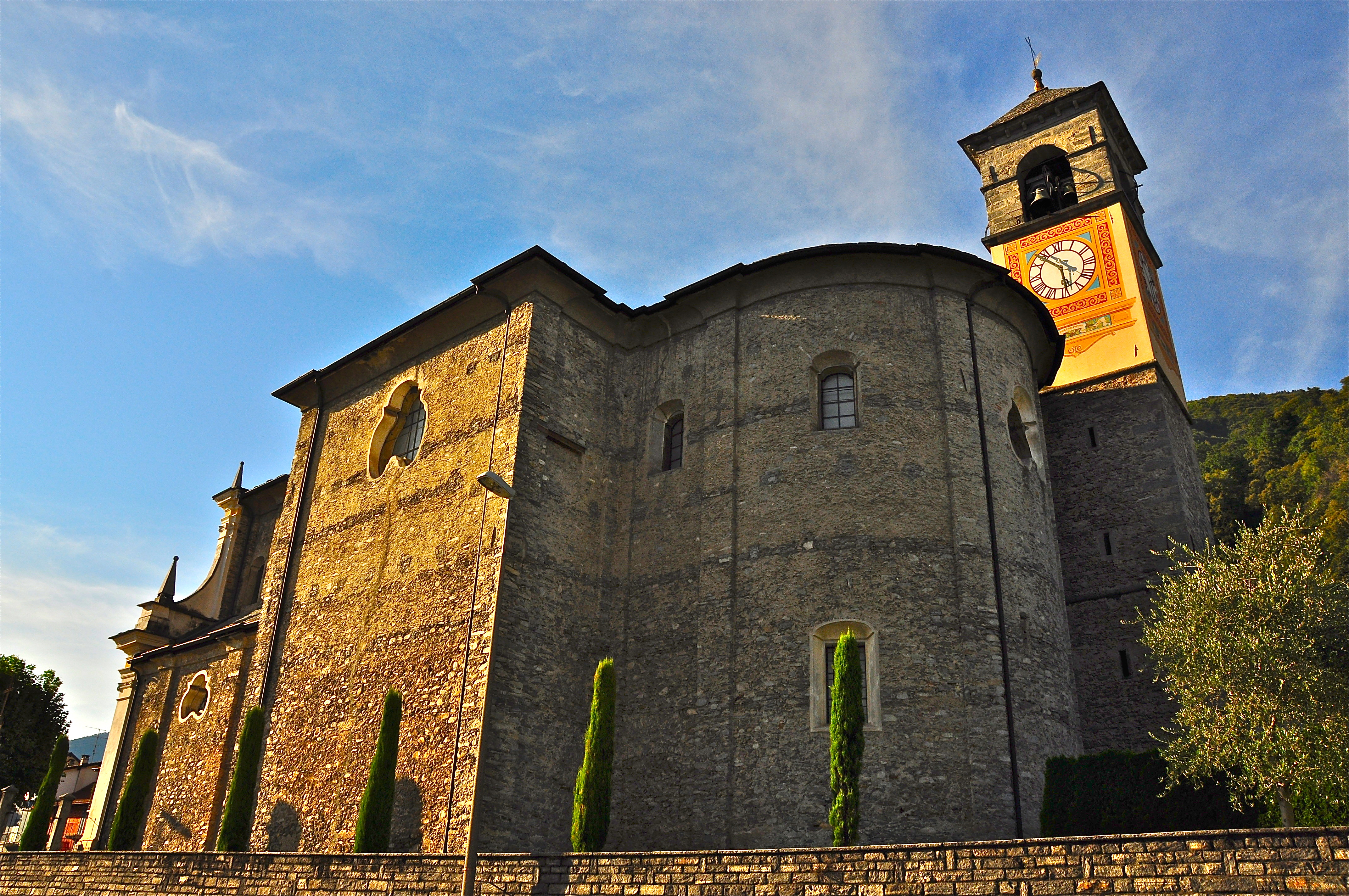 Vista dal retro.